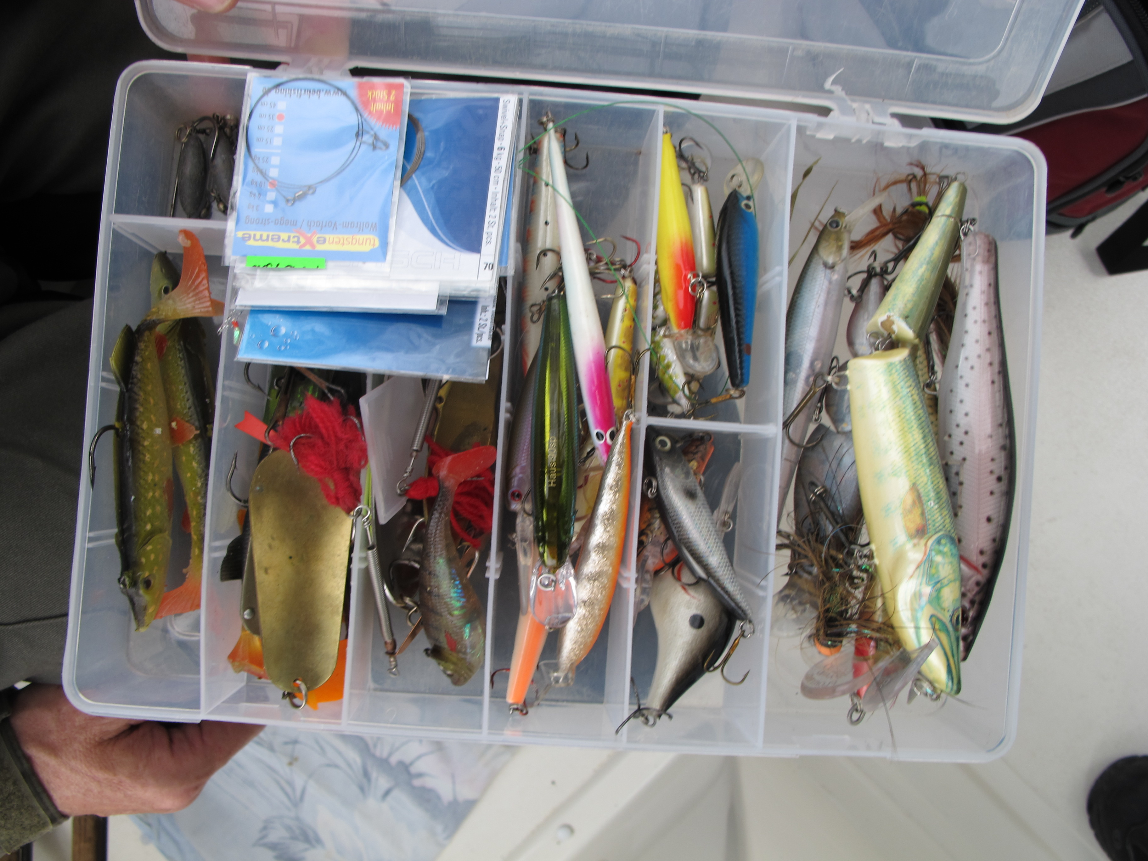 Grössere Köder für Hechtfischen, Schonzeiten beachten